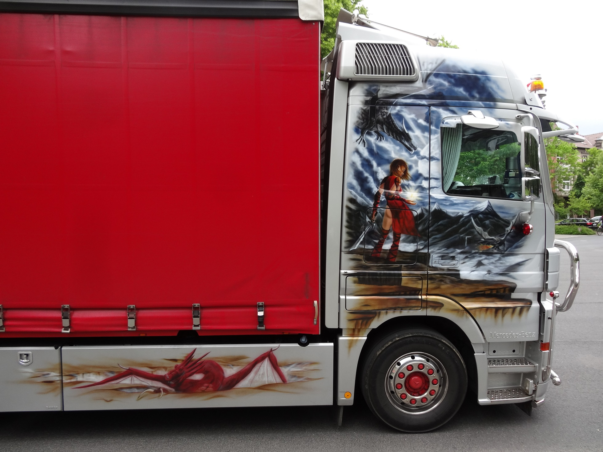 Sattelzugmaschine mit Fantasymotiven